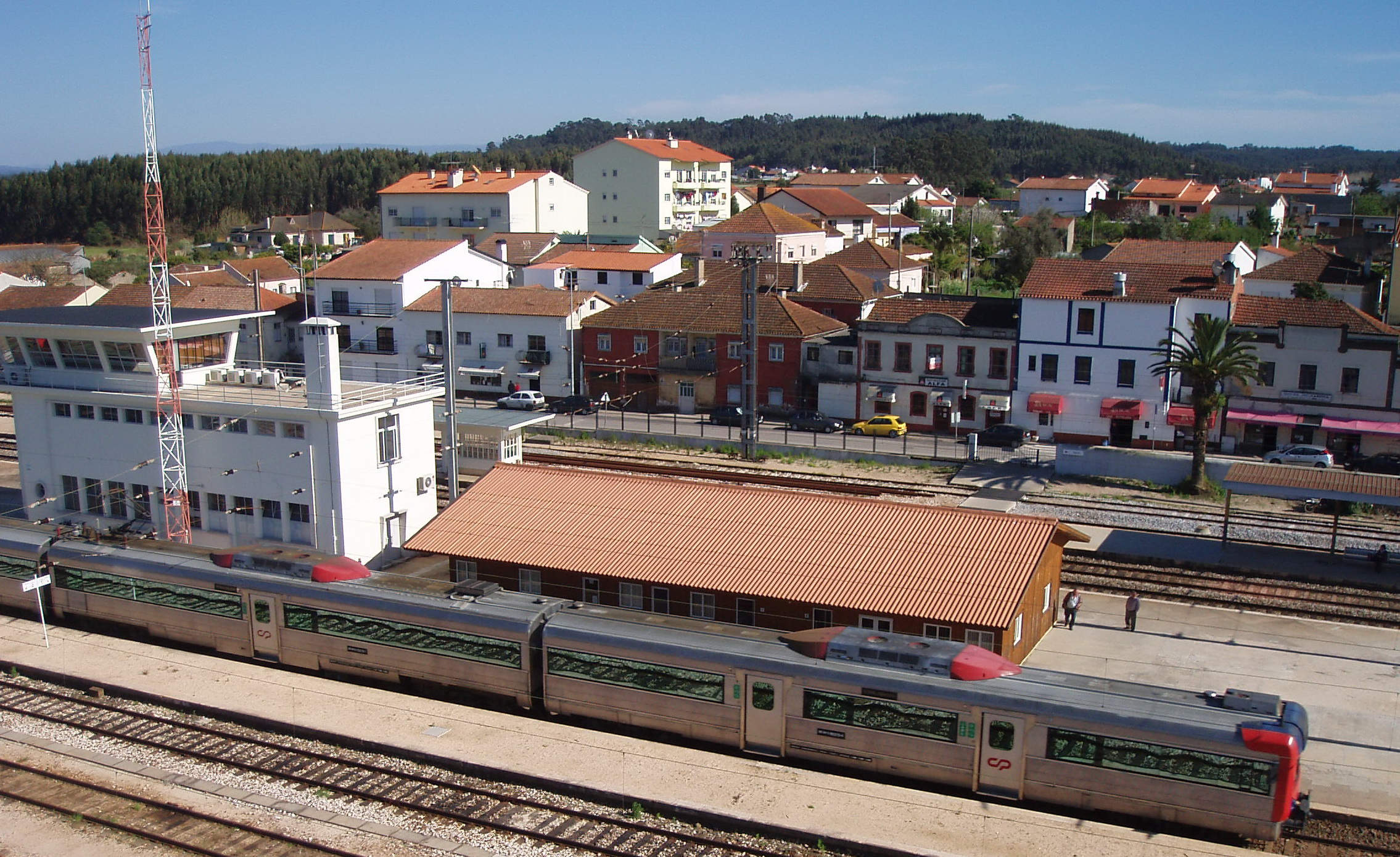 Estação de caminhos de ferro de Alfarelos, na localidade Granja do Ulmeiro